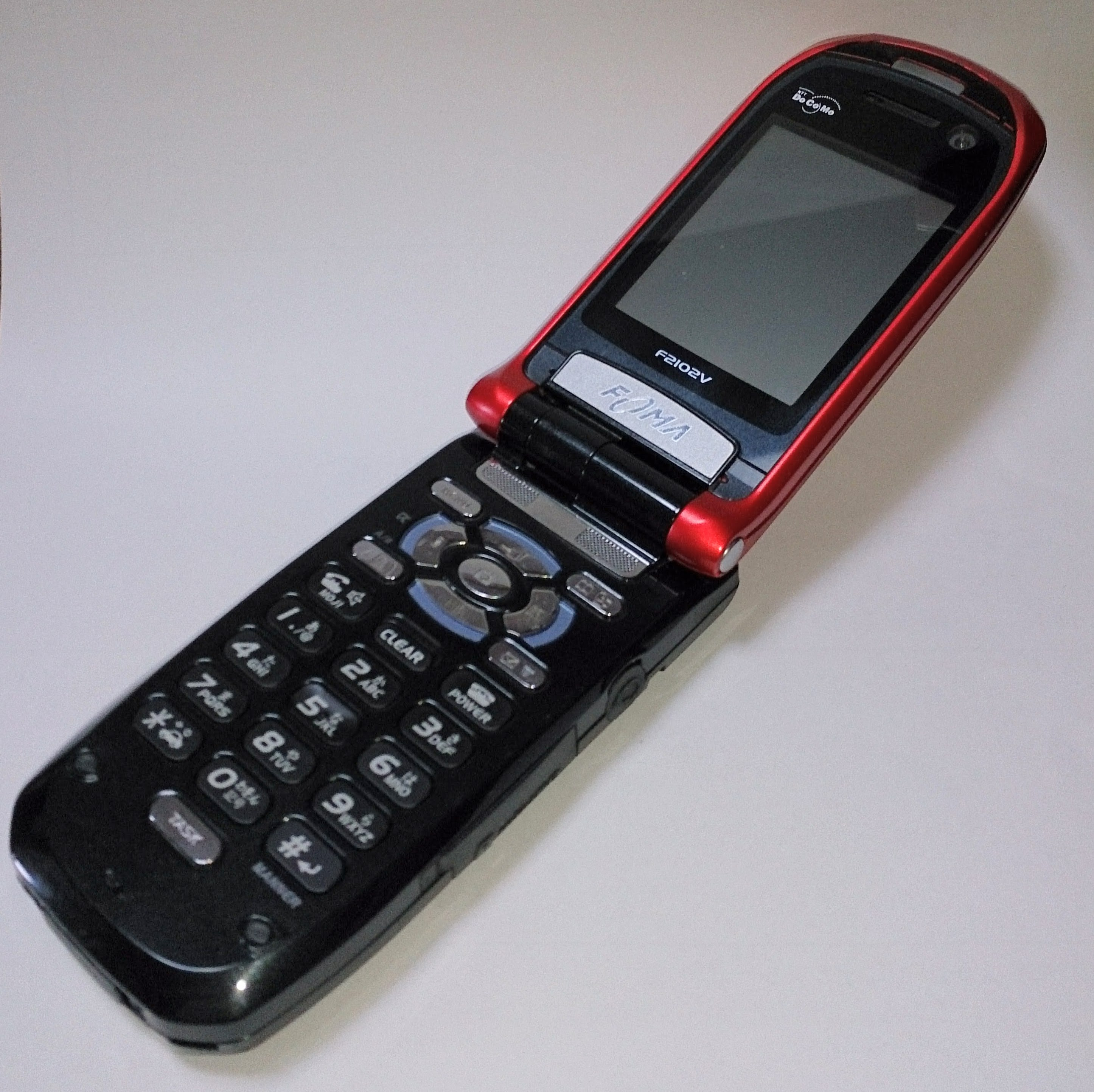 F2102V